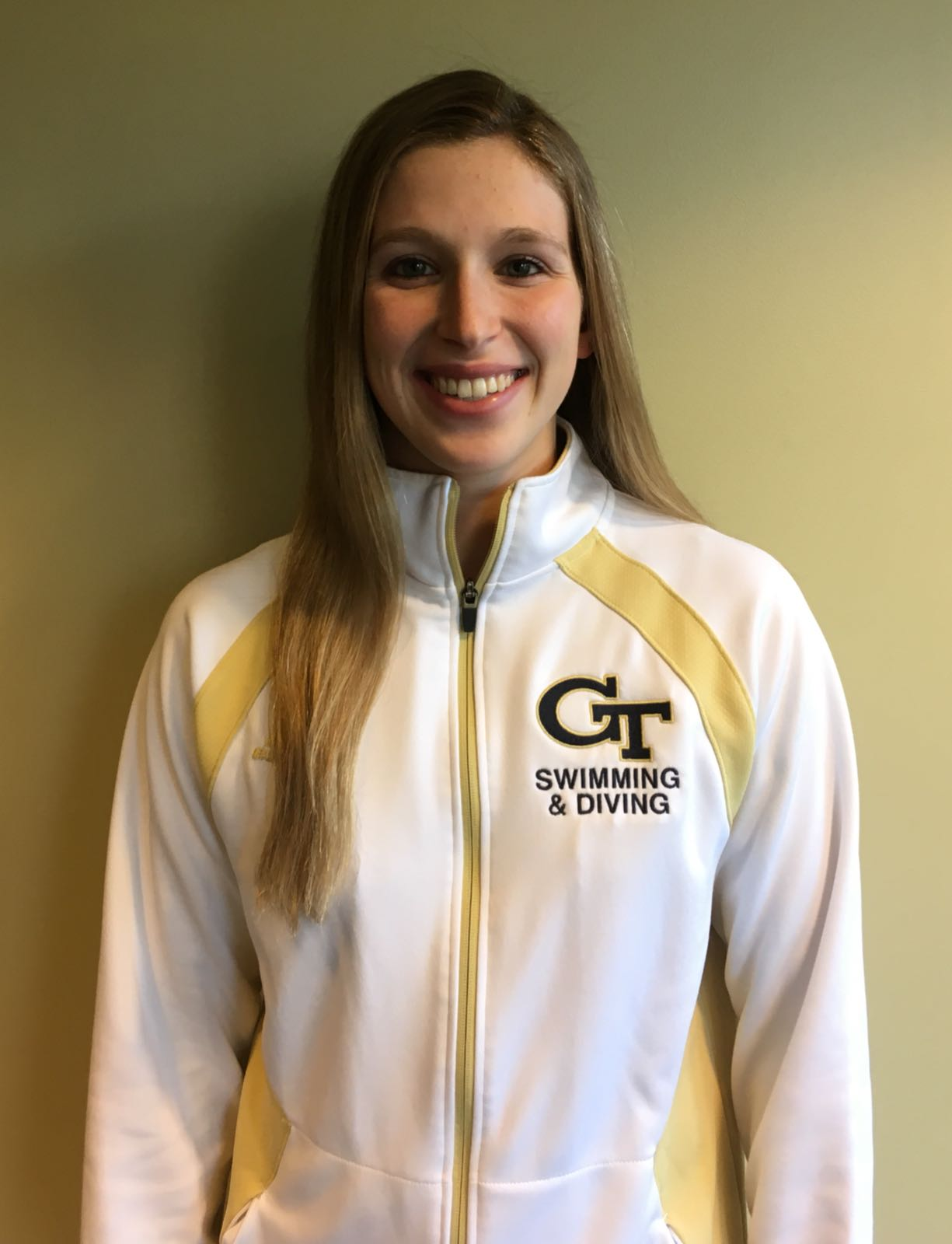 טמיר גונן כהן, ג'ורג'יה טק, 2017